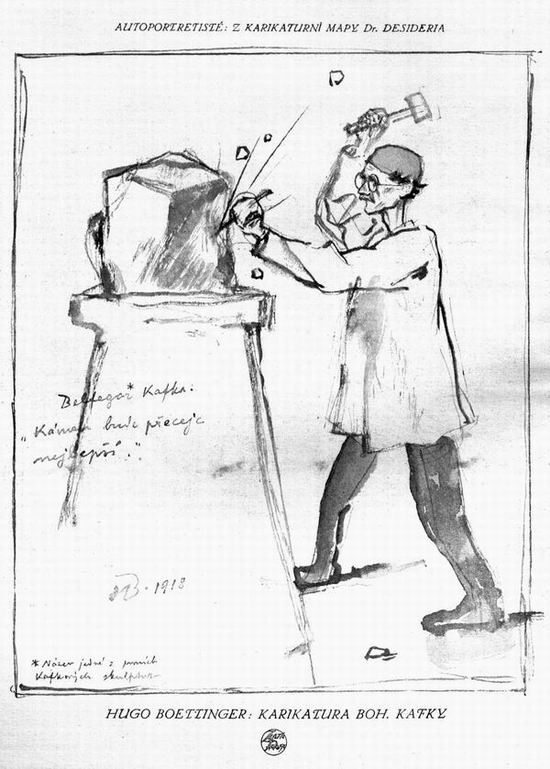 Česky: V kavárně